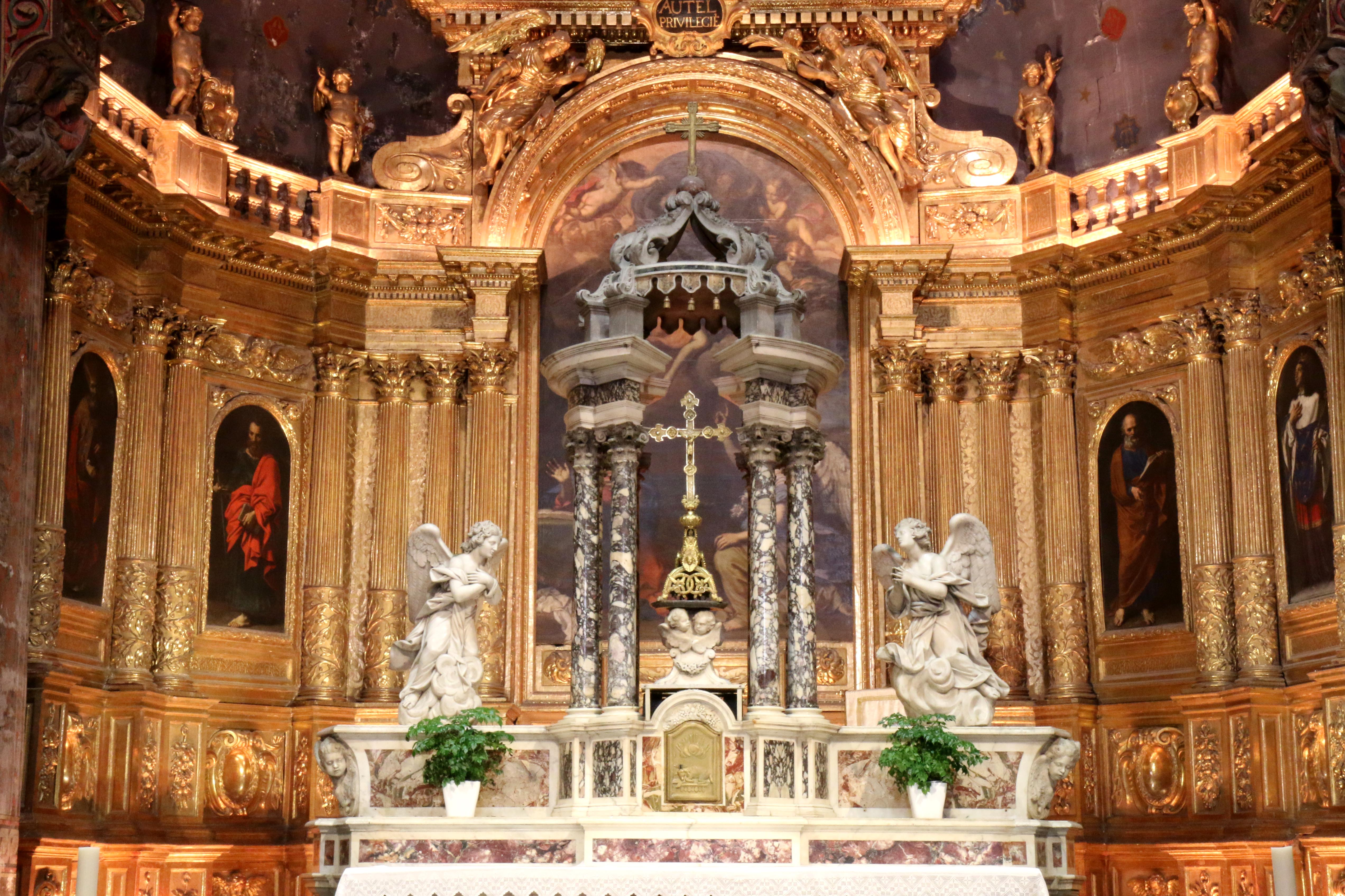 Autel et retable de l'abside de la cathédrale de Cavaillon.